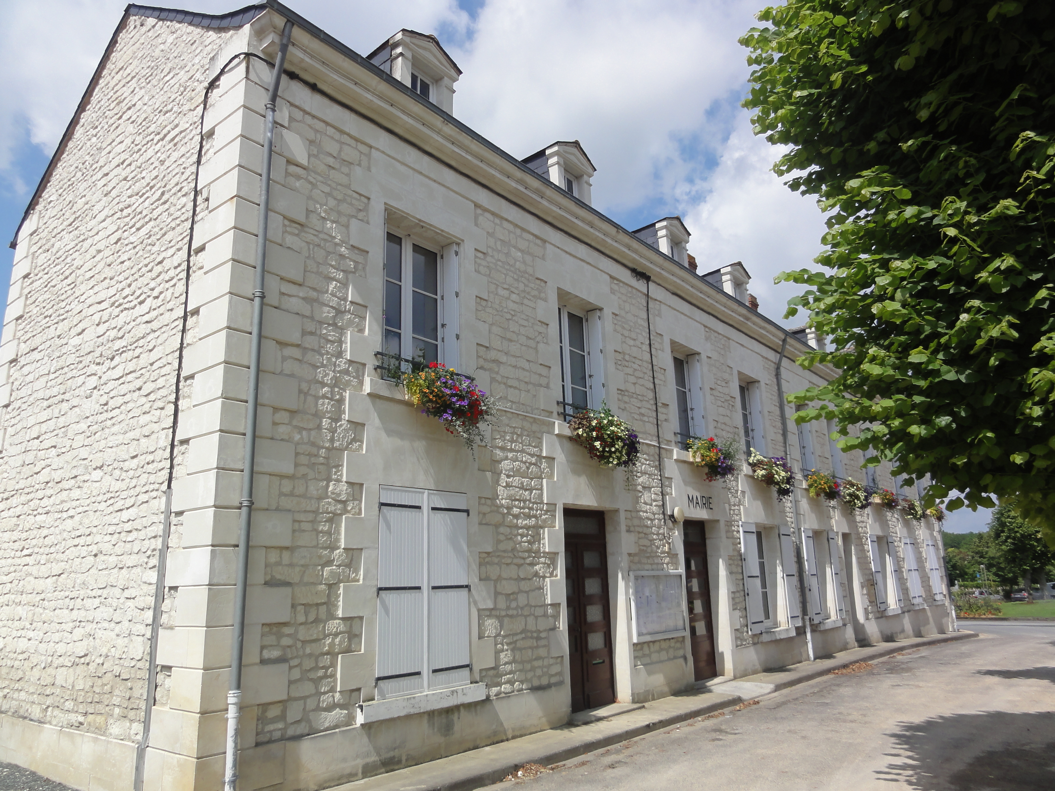 Antran (Vienne) Mairie